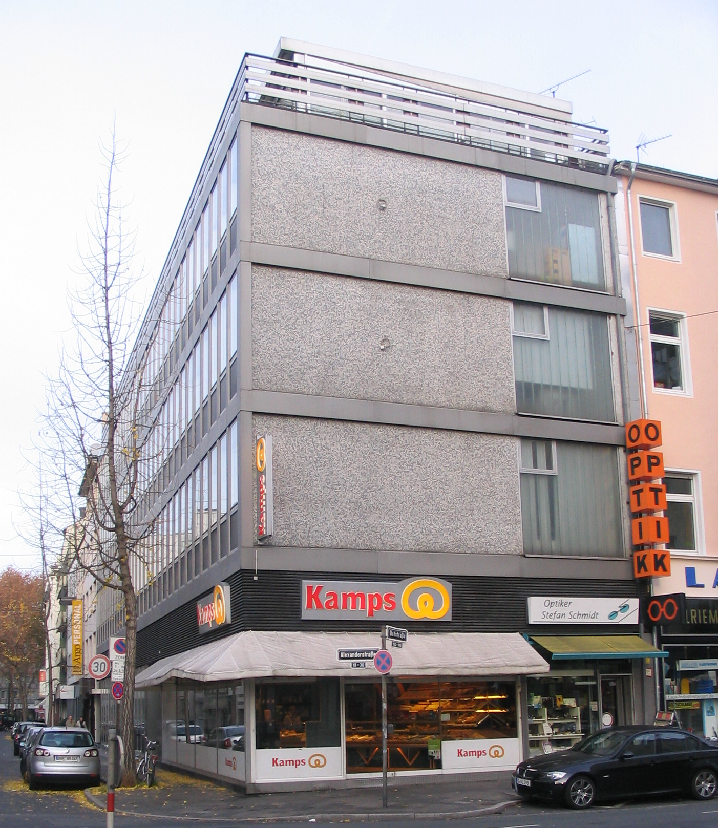 Zatra-Haus, Düsseldorf, Alexanderstraße 36 und 38, Ecke Oststraße. Die noch vorhandenen Überreste vom Zatra-Haus (Architekt: Paul Schneider-Esleben - das Gebäude wurde auf einem Trümmergrundstück gebaut, Bauzeit 1951 - 1952) befinden sich Oststraße, Ecke Alexanderstraße. Die ursprüngliche Fassade aus eloxiertem Aluminium, weißem Glasmosaik und opakem Glas, hellblau gestrichenen Stahlfensterrahmen und einer Glashaut, die den Blick auf den Betonkörper freigab, ist heute verschwunden, ebenso das Mosaik an der Fassade von Georg Meistermann. Bei der Zatra handelte es sich die nach ihren Gründen Zangen und Trappen benannte Firma Zatra, die Transportsysteme für größere Werke plante.